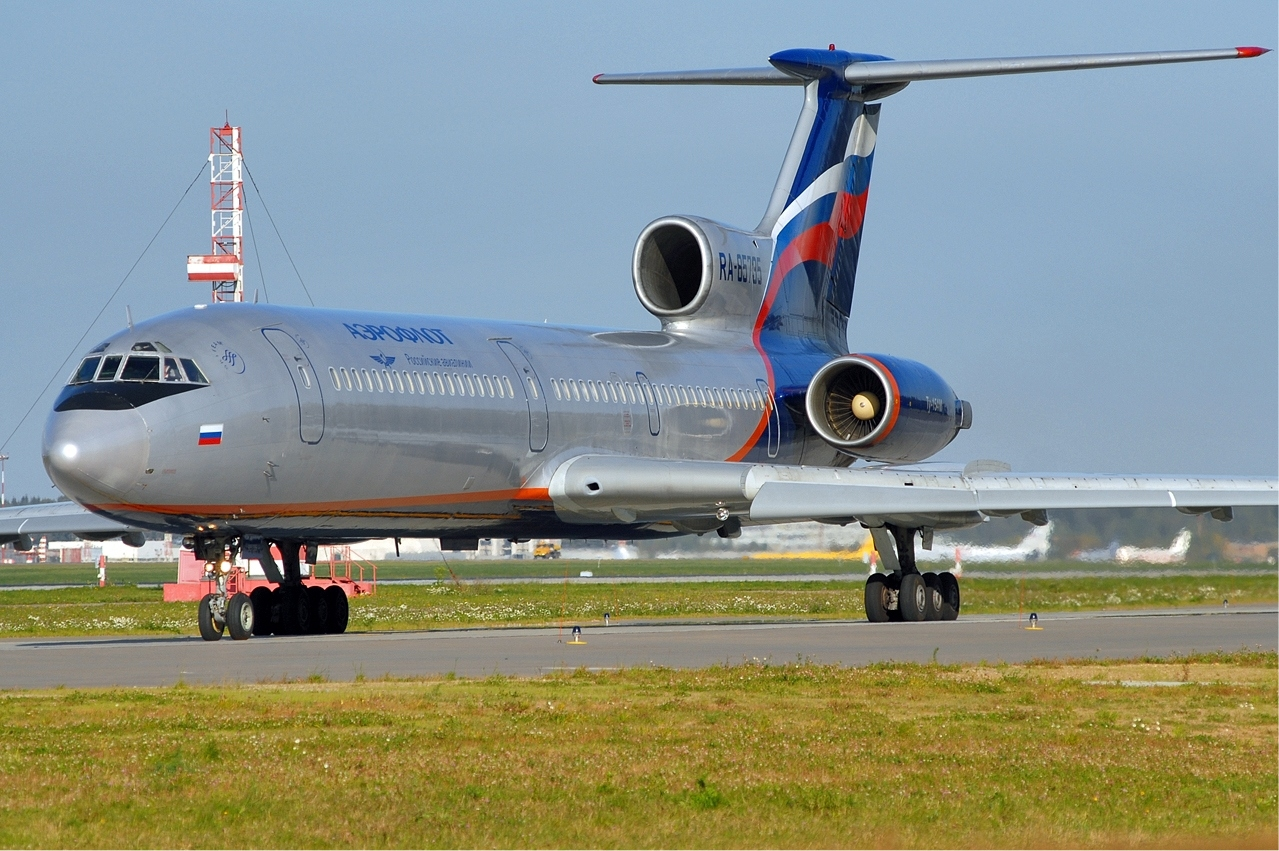 Aeroflot Tupolev Tu-154M